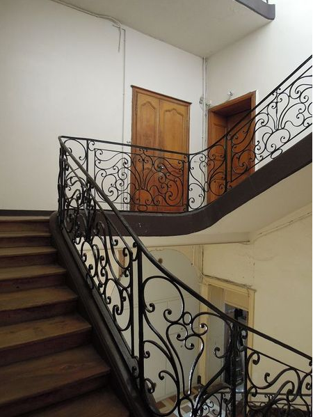 Ancien hôtel de Mac-Nemara, construit vers 1725-1745. escalier.